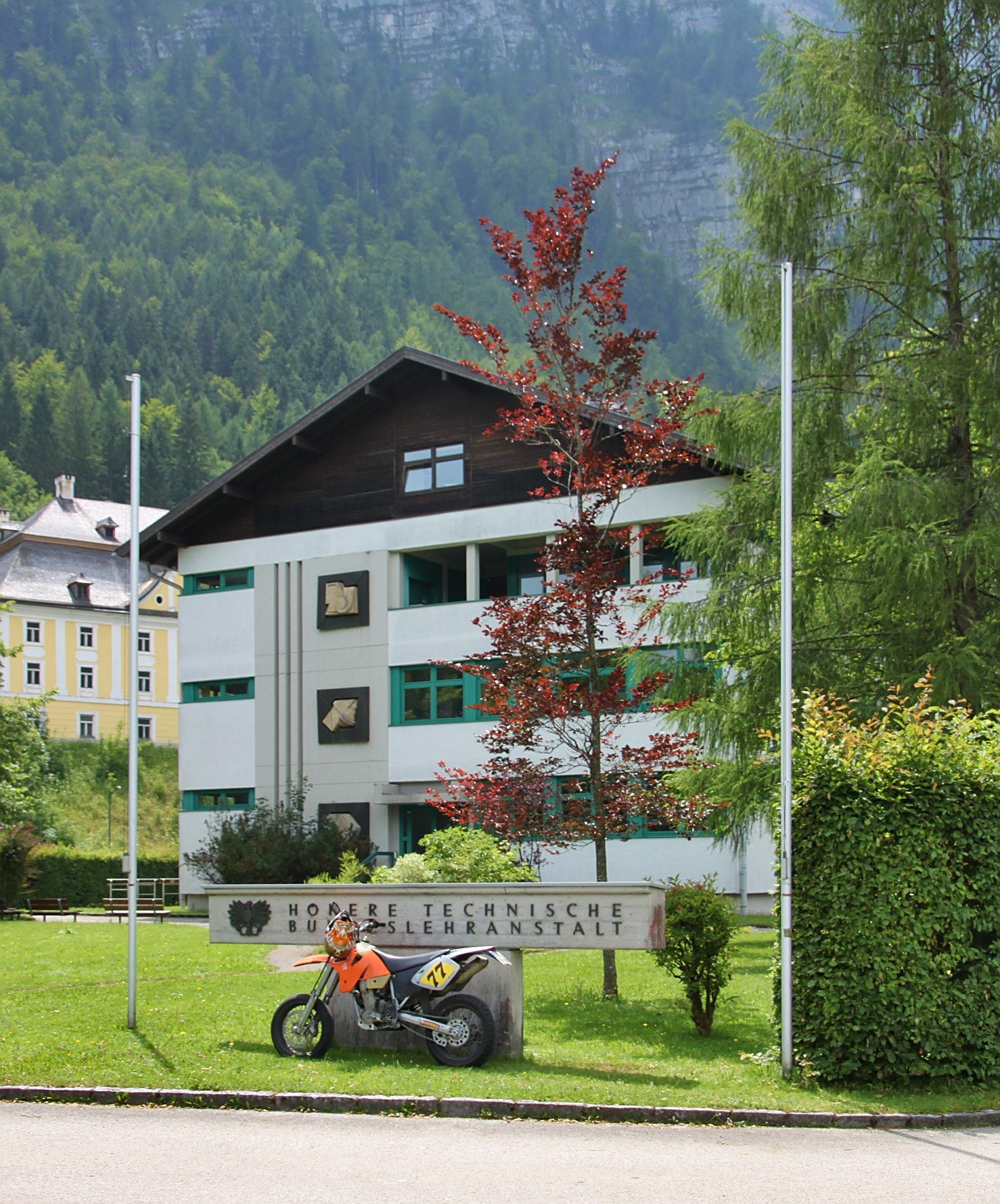 Hallstatt, Austria